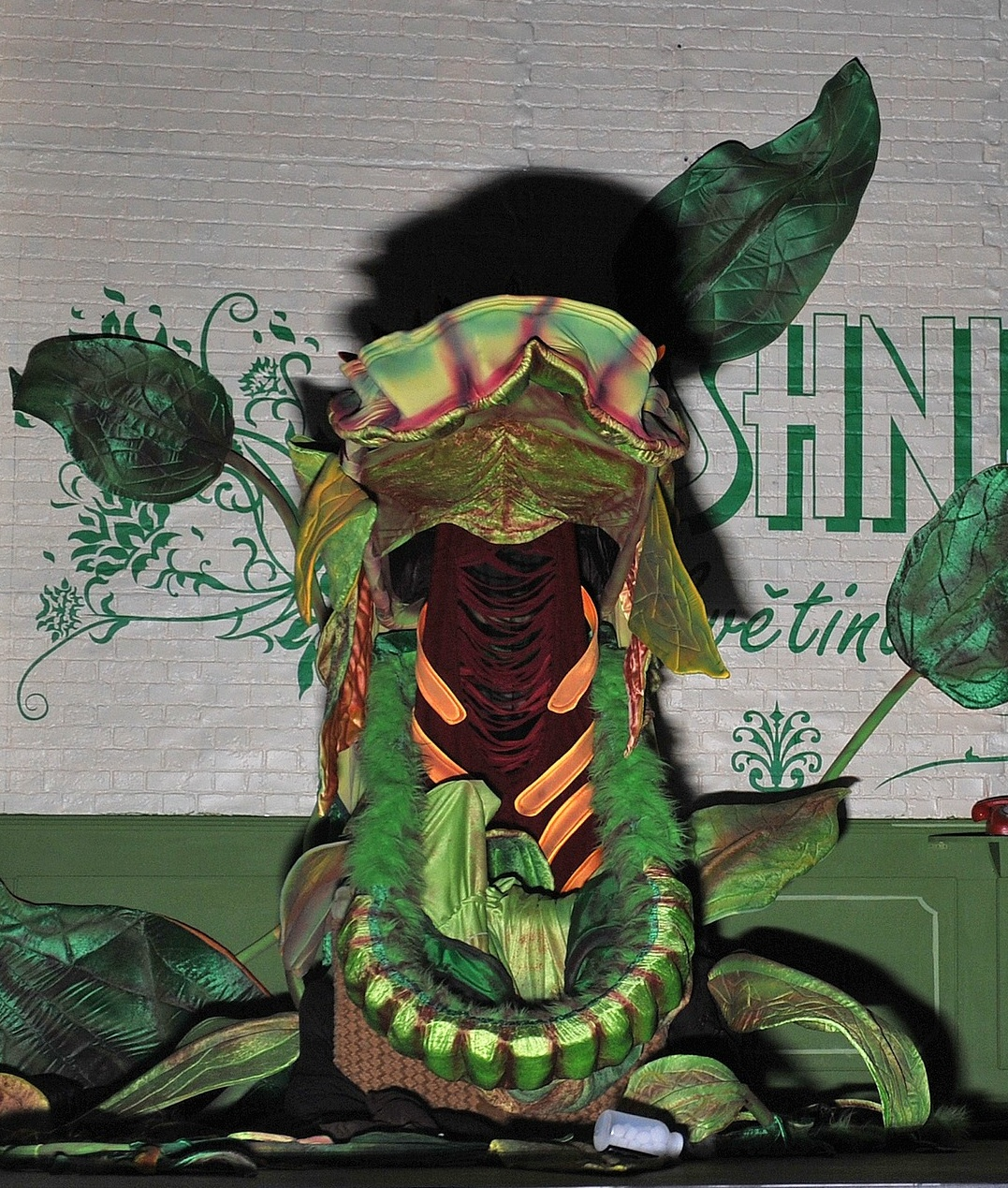 Muzikál MdB